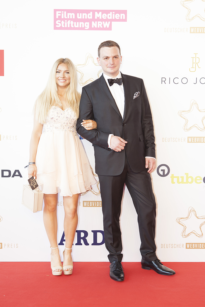 Shirin David und Jan Rode, Webvideopreis 2015